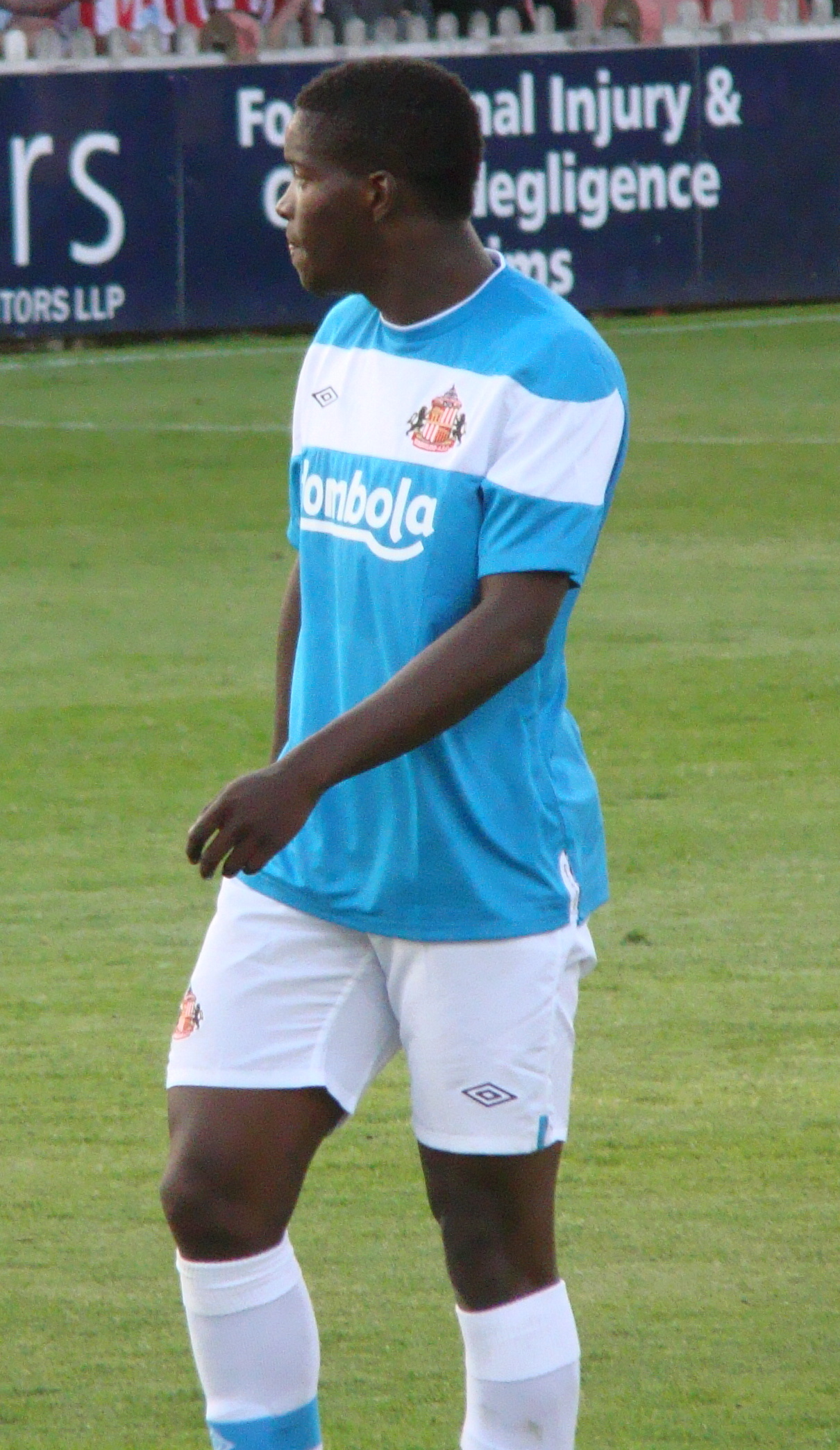 Oumare Tounkara